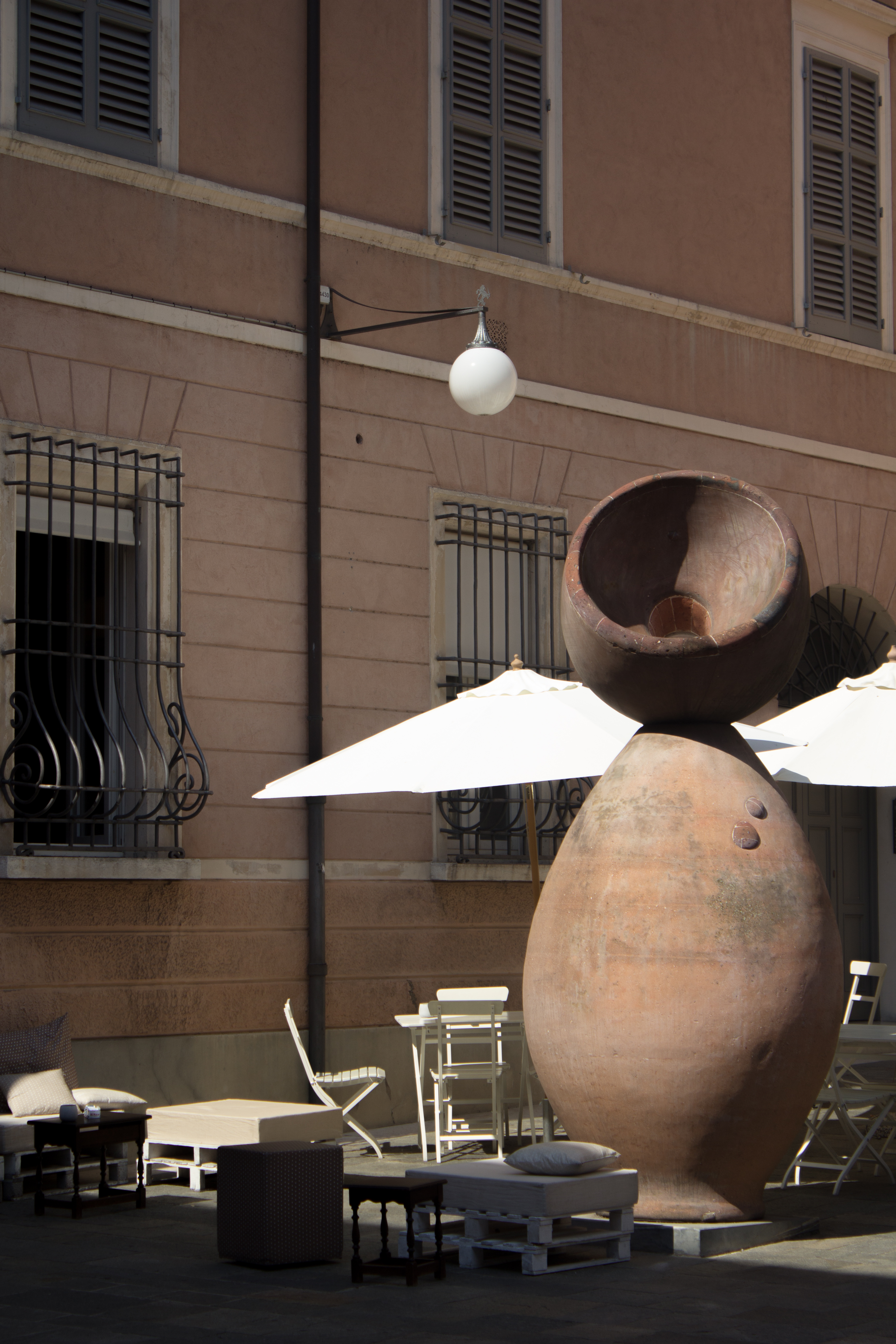 Museo all'aperto di opere di arte contemporanea, opera: “Anfora” di Franz Stahler – 2000 Corso Mazzini Opera in terracotta (340x120). This is a photo of a monument which is part of cultural heritage of Italy.